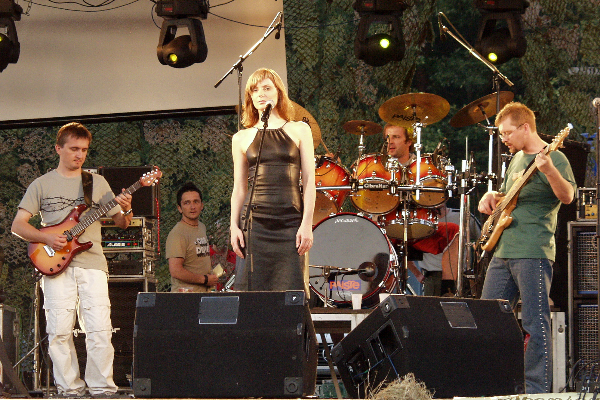 Zespół Brathanki na koncercie w Bydgoskim Myślęcinku. W składzie zespołu jako solistka Halina Mlynková.